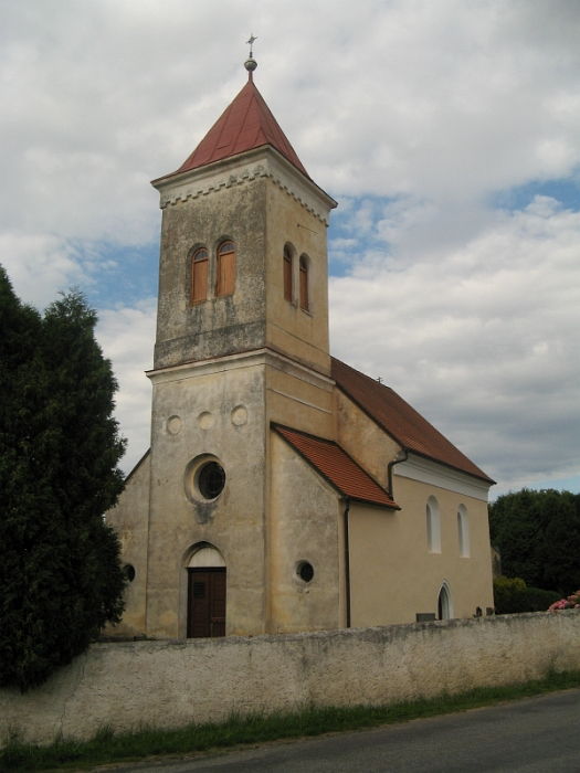 Kostel sv. Havla (Hošťalovice), J okraj vsi, Hošťalovice, Hošťalovice.